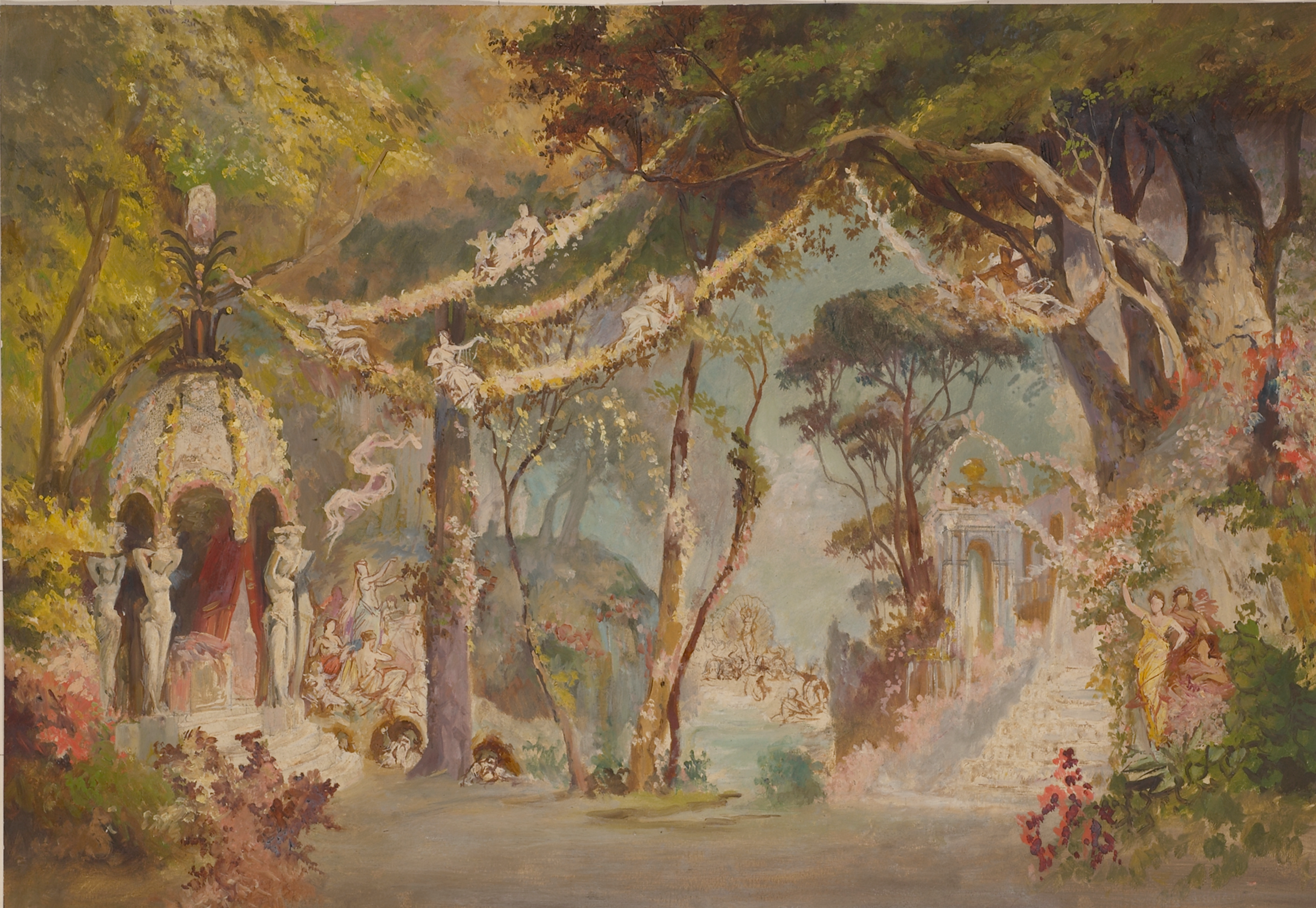 Feerie, Bühnenbildentwurf zur Uraufführung der Oper Merlin von Hermann Burghart